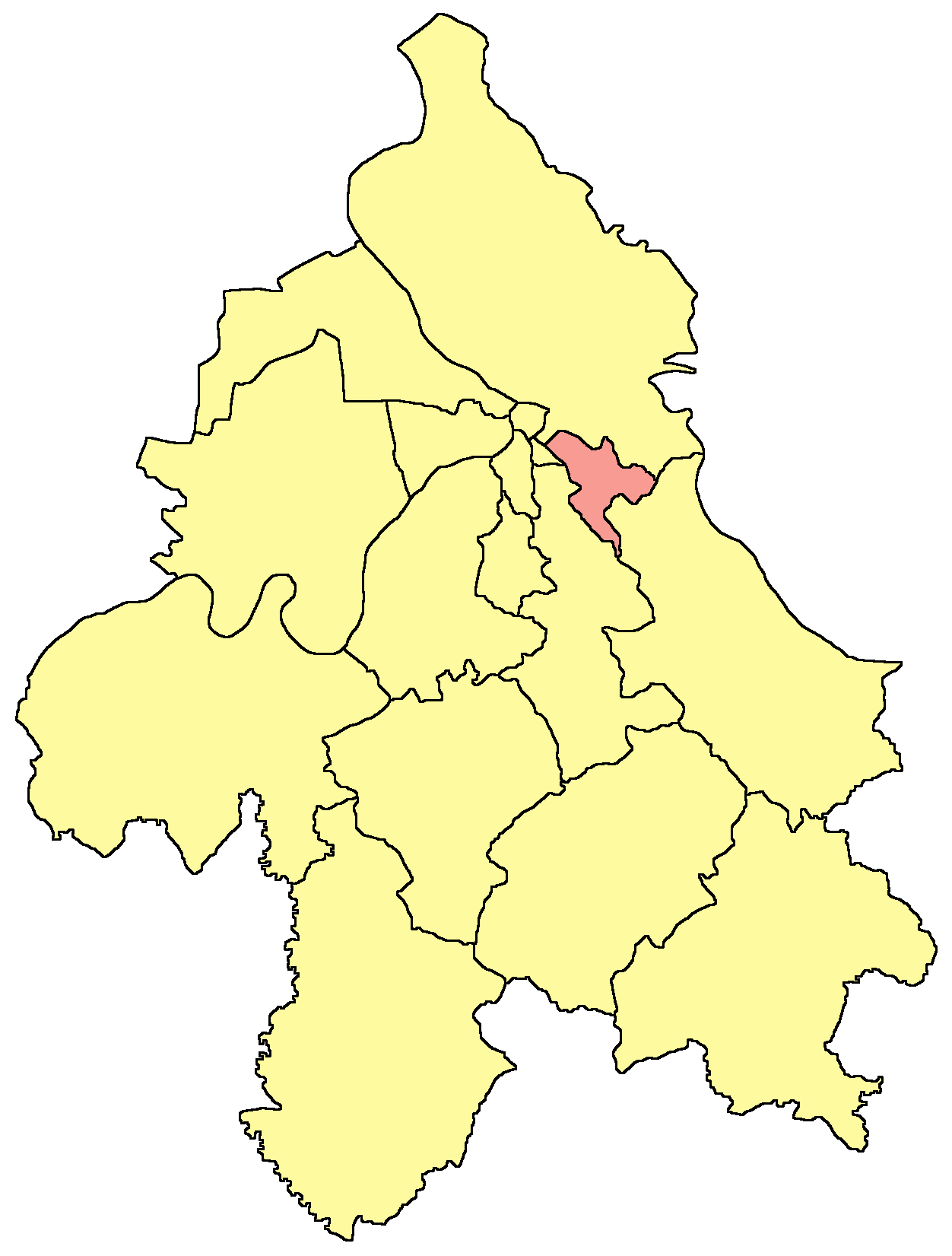 Belgrade municipality map